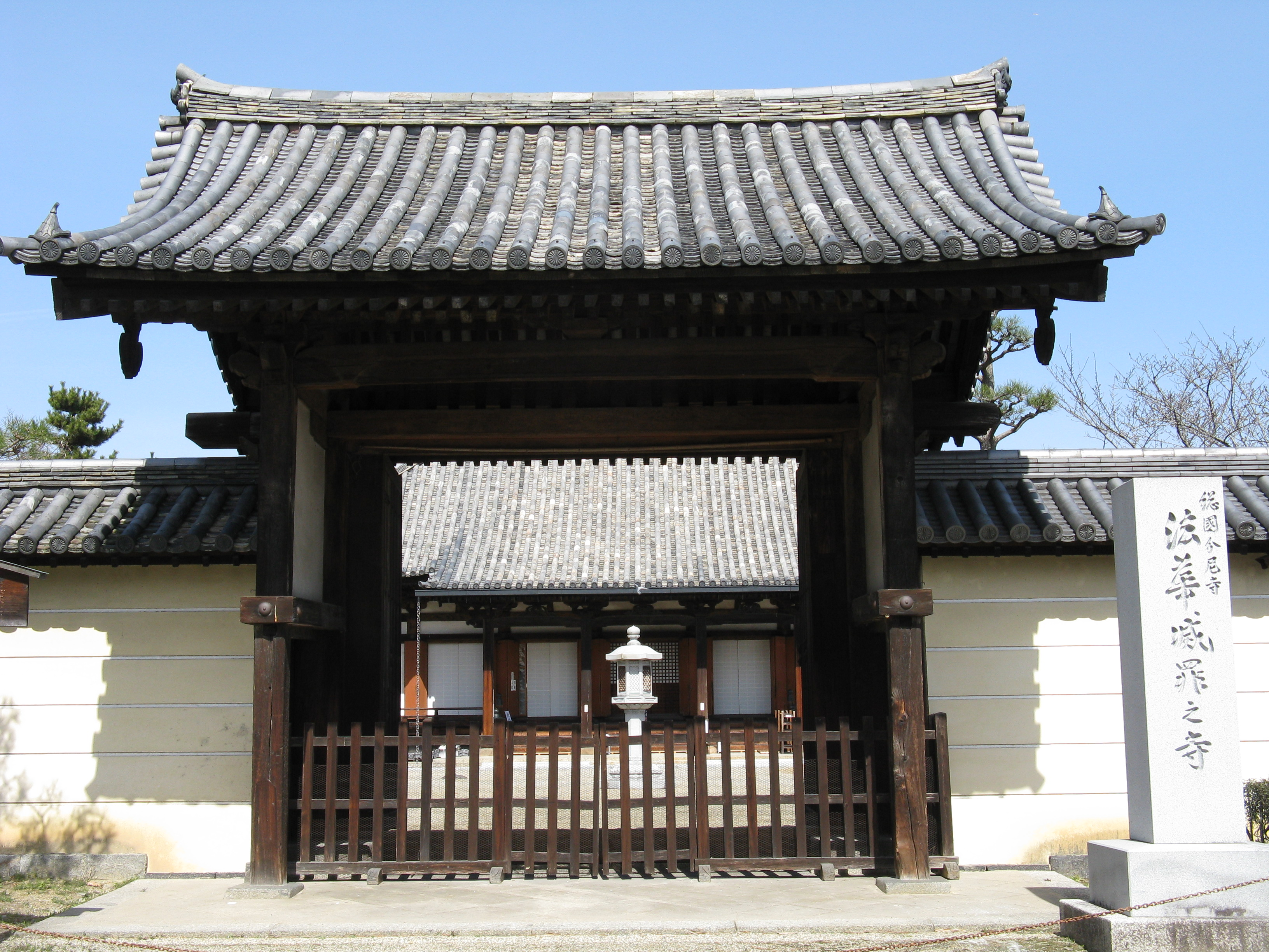 法華滅罪之寺 南大門